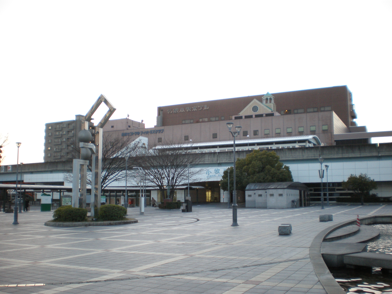 愛知県小牧市にある小牧駅・駅ビル